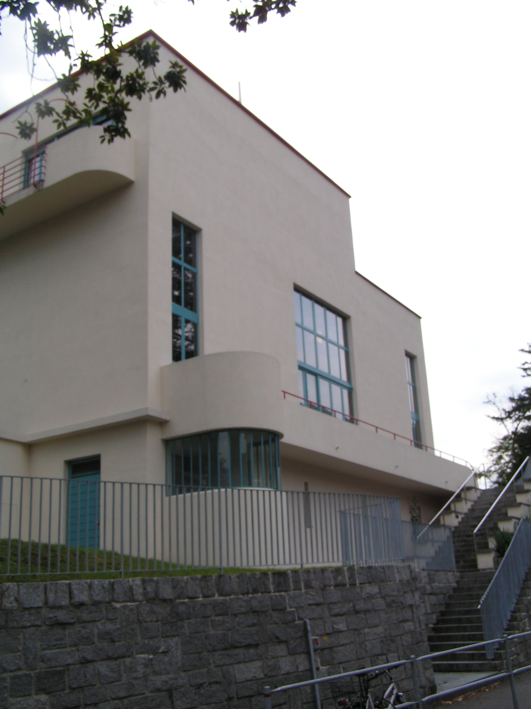 Via Losone 3, Ascona. Teatro San Materno.